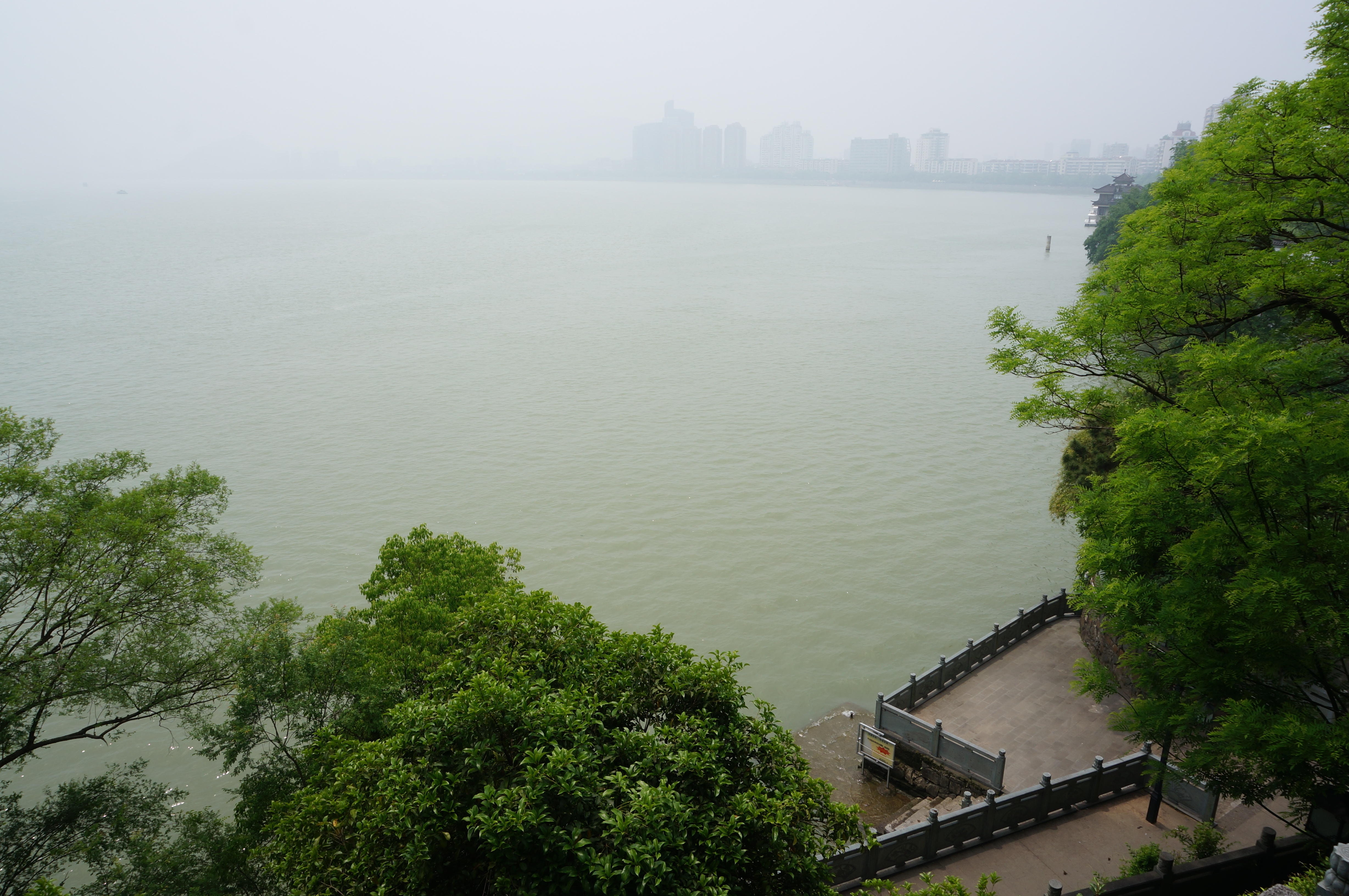 自鹳山春江第一楼望富春江。